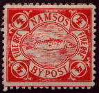 Bypost: 4 øres frimerke fra Namsos (1888-1889). Som vi ser var også bypostmerkene opptatt av lokale motiv.